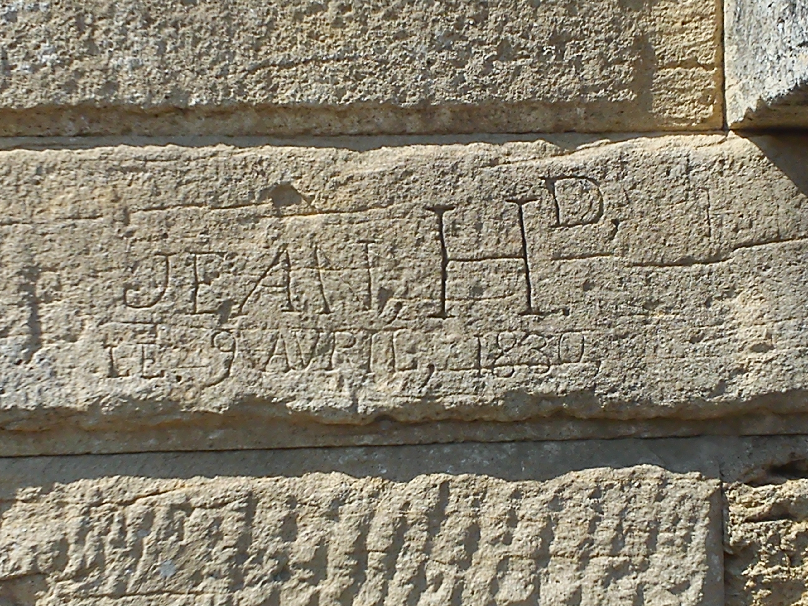 On peut lire sur la photographie "JEAN, Hᴰ, LE 9 AVRIL, 1830.